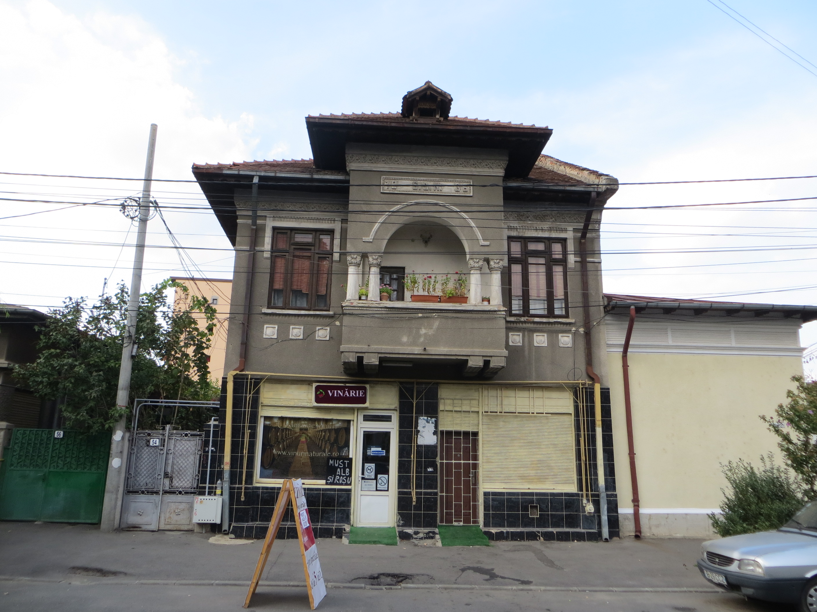 Parcelarea Grant